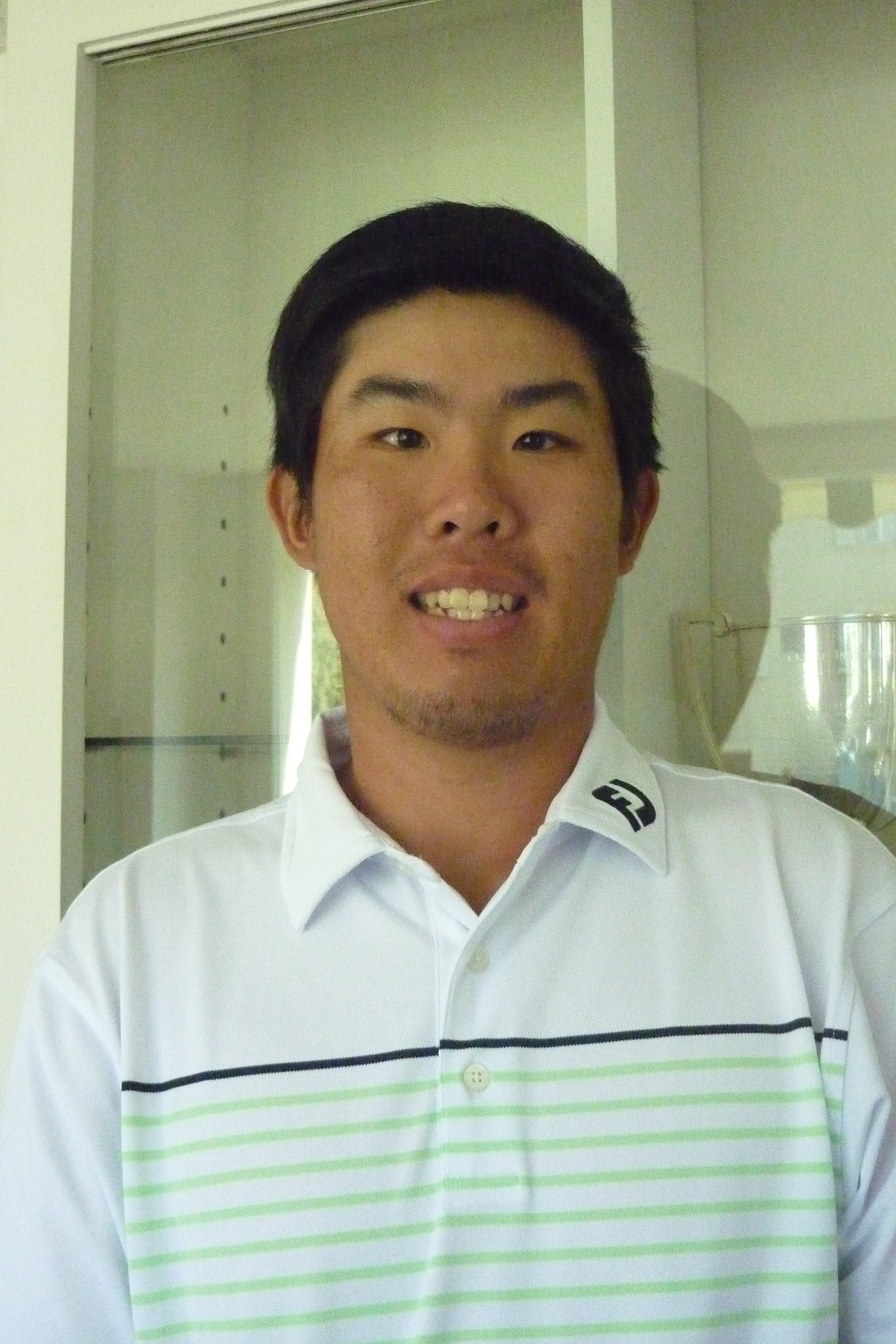 Byeong-hun An